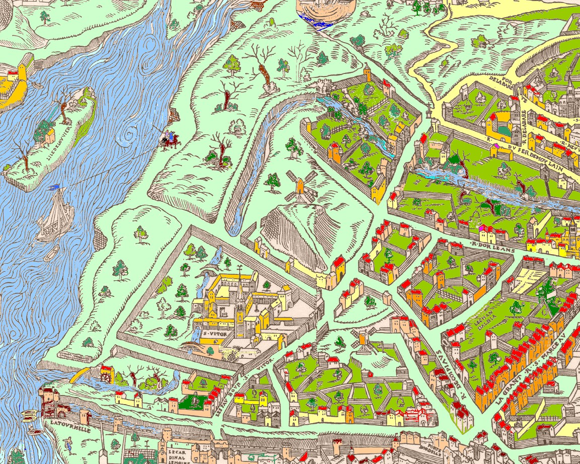 "Plan de Bâle" ; le détournement de la Bièvre affluent de la Seine de Paris par les moines de Saint Victor.